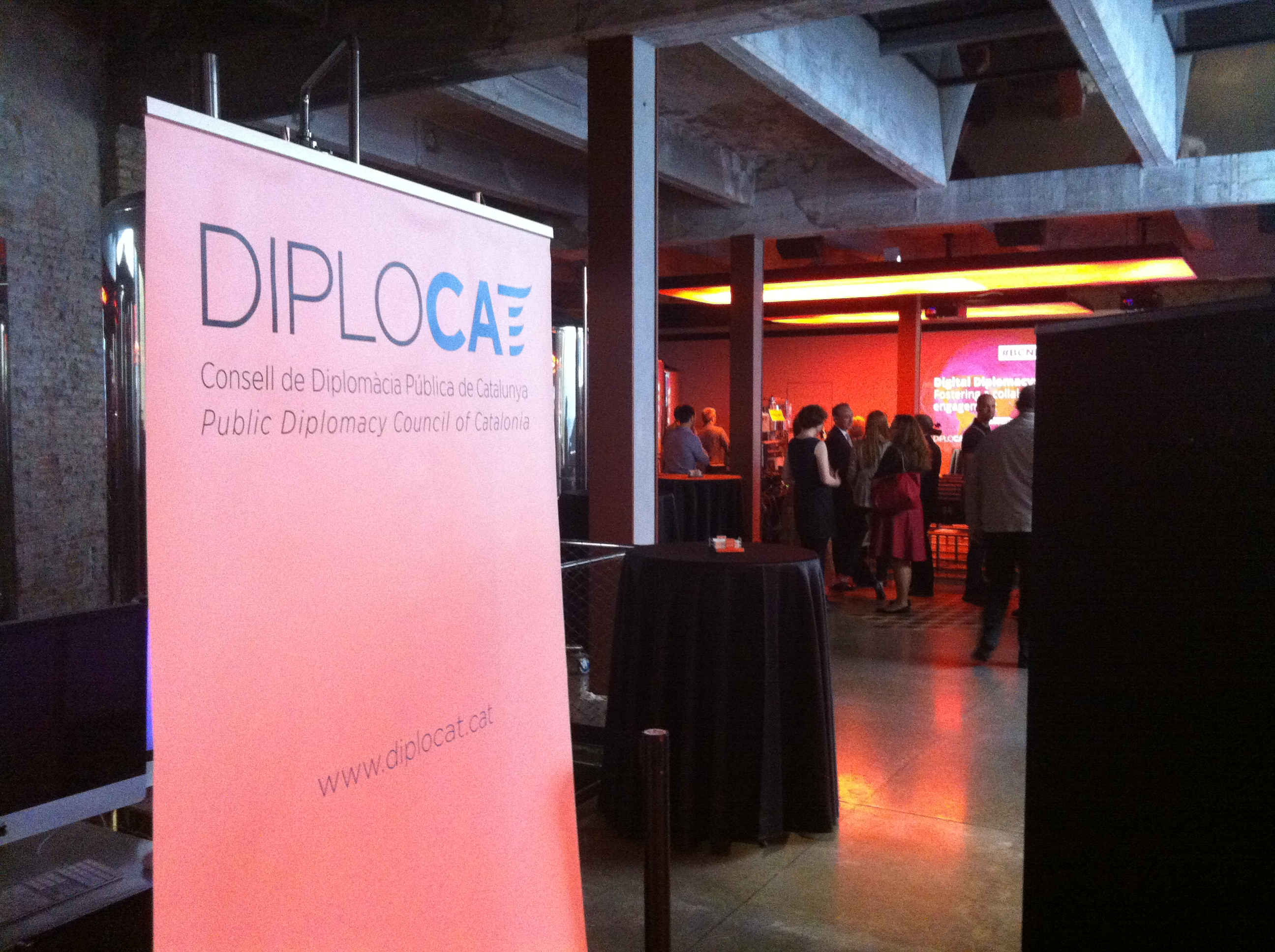 Public Diplomacy Council of Catalonia